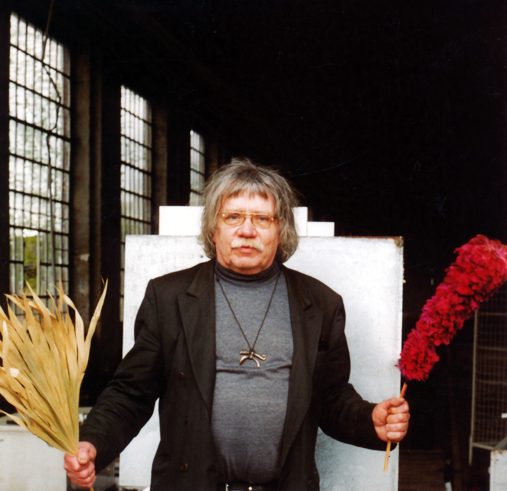 Janus Kadel bei einer Ausstellungseröffnung.